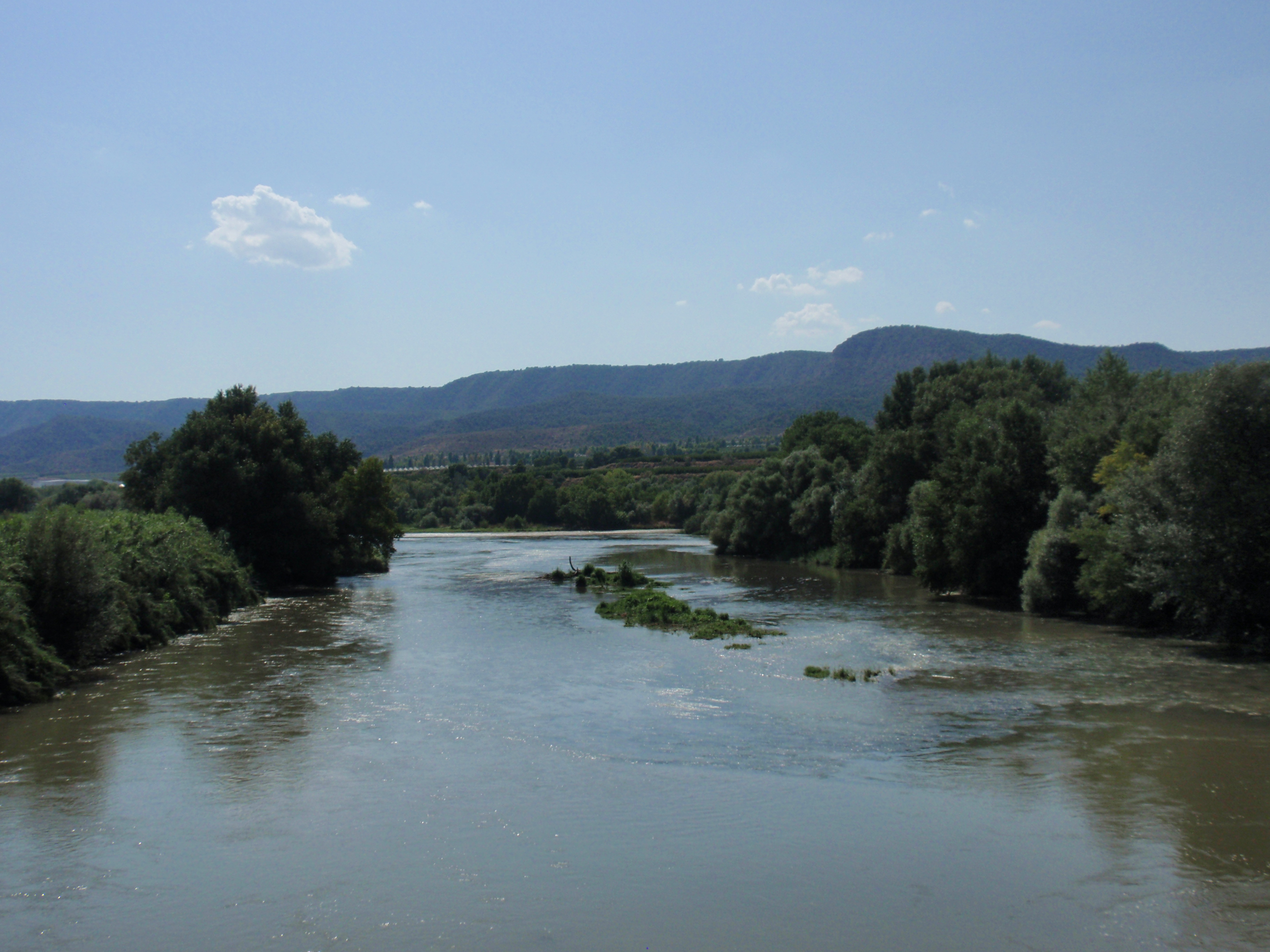 Aiguabarreig Segre-Cinca (Segrià) This is a a photo of a natural area in Catalonia, Spain, with id: ES510076